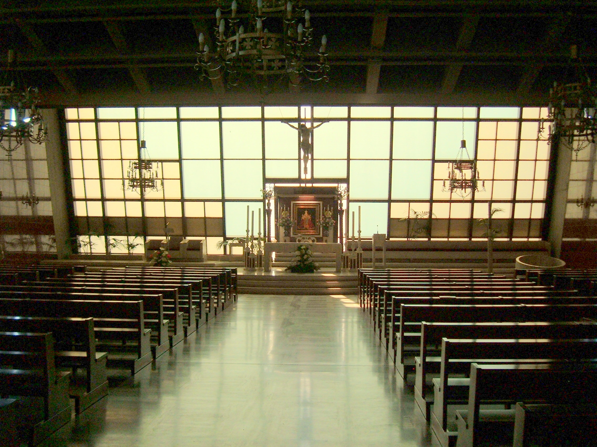 Chiesa di Nostra Signora di Valme, a Roma, nel quartiere Portuense.